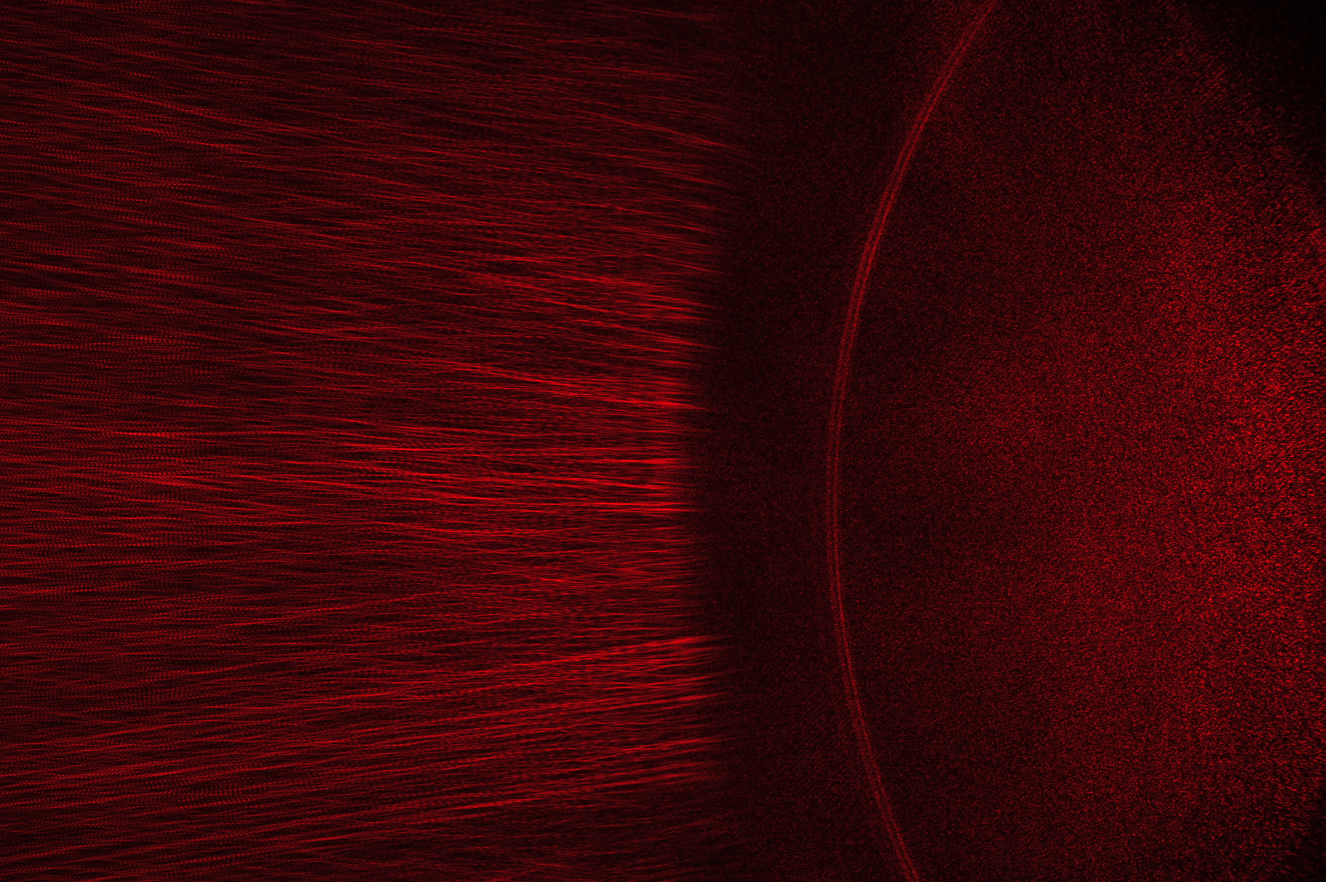 Bildergebnis bei unerwüschtem Gegenlicht durch einen roten Laser 10° außerhalb des Bildfeldes